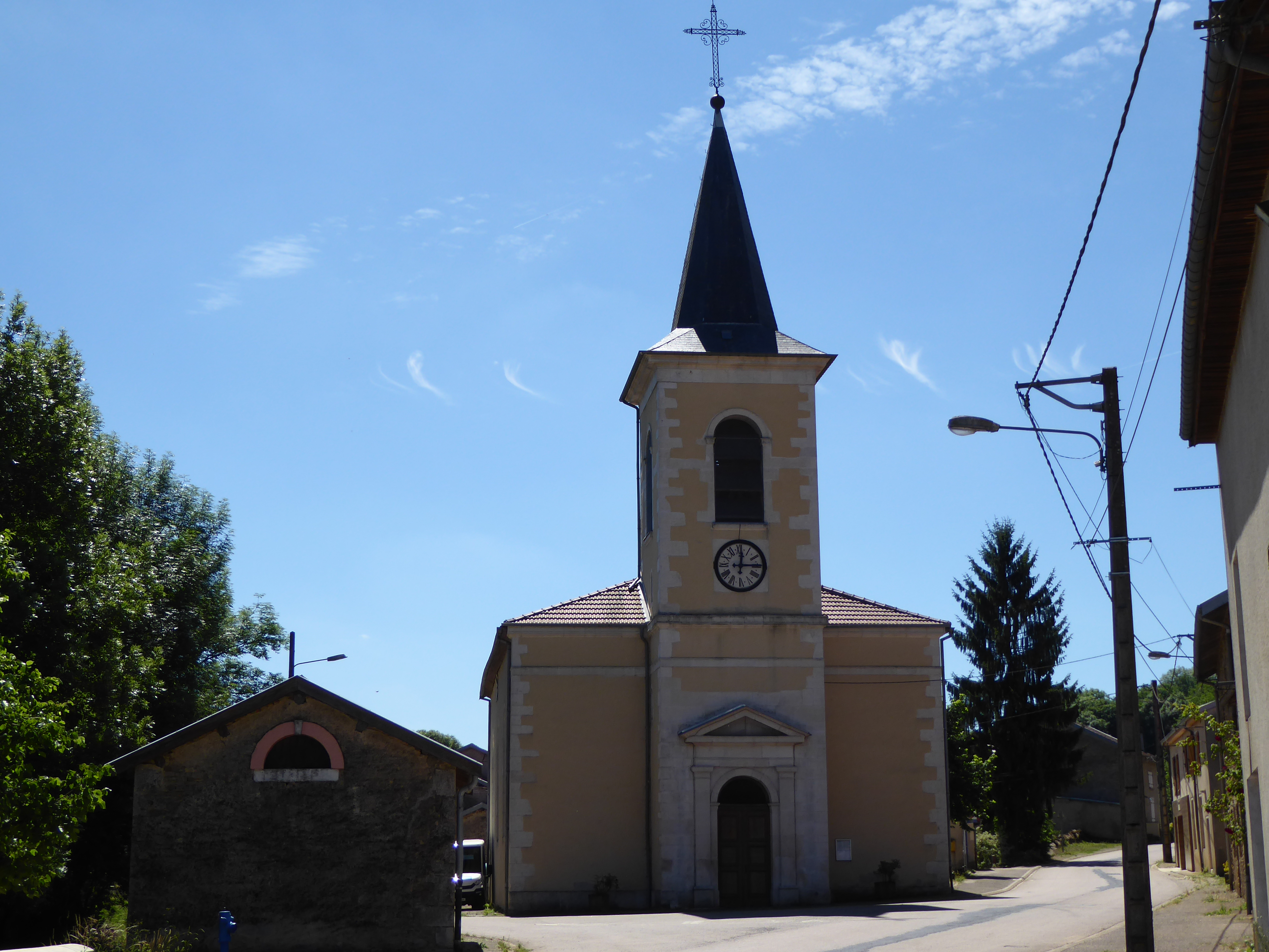 Église de Gémonville en Meurthe-et-Moselle